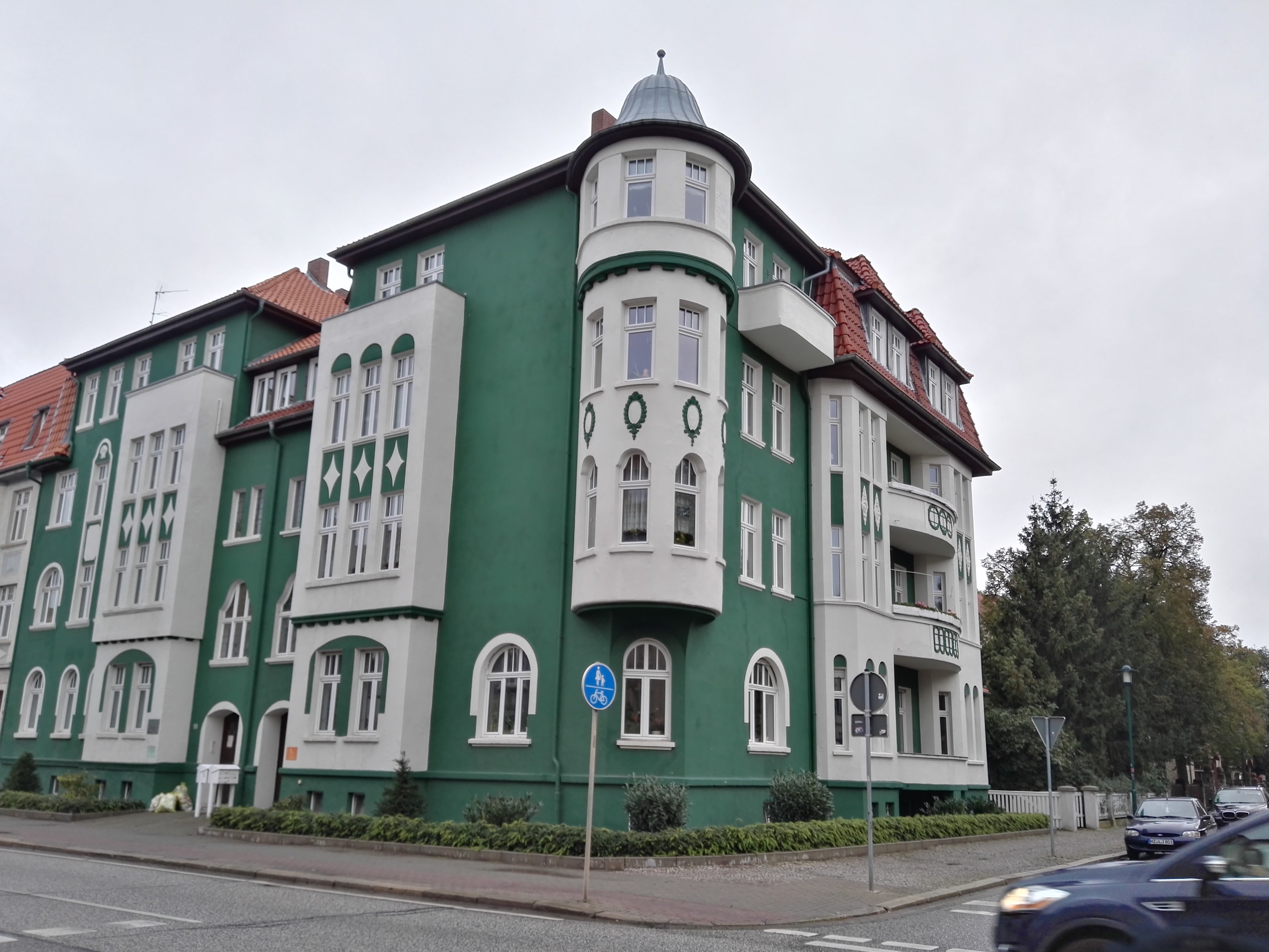 Denkmalgeschütztes Wohnhaus in der Friedensstraße 54 in Halberstadt